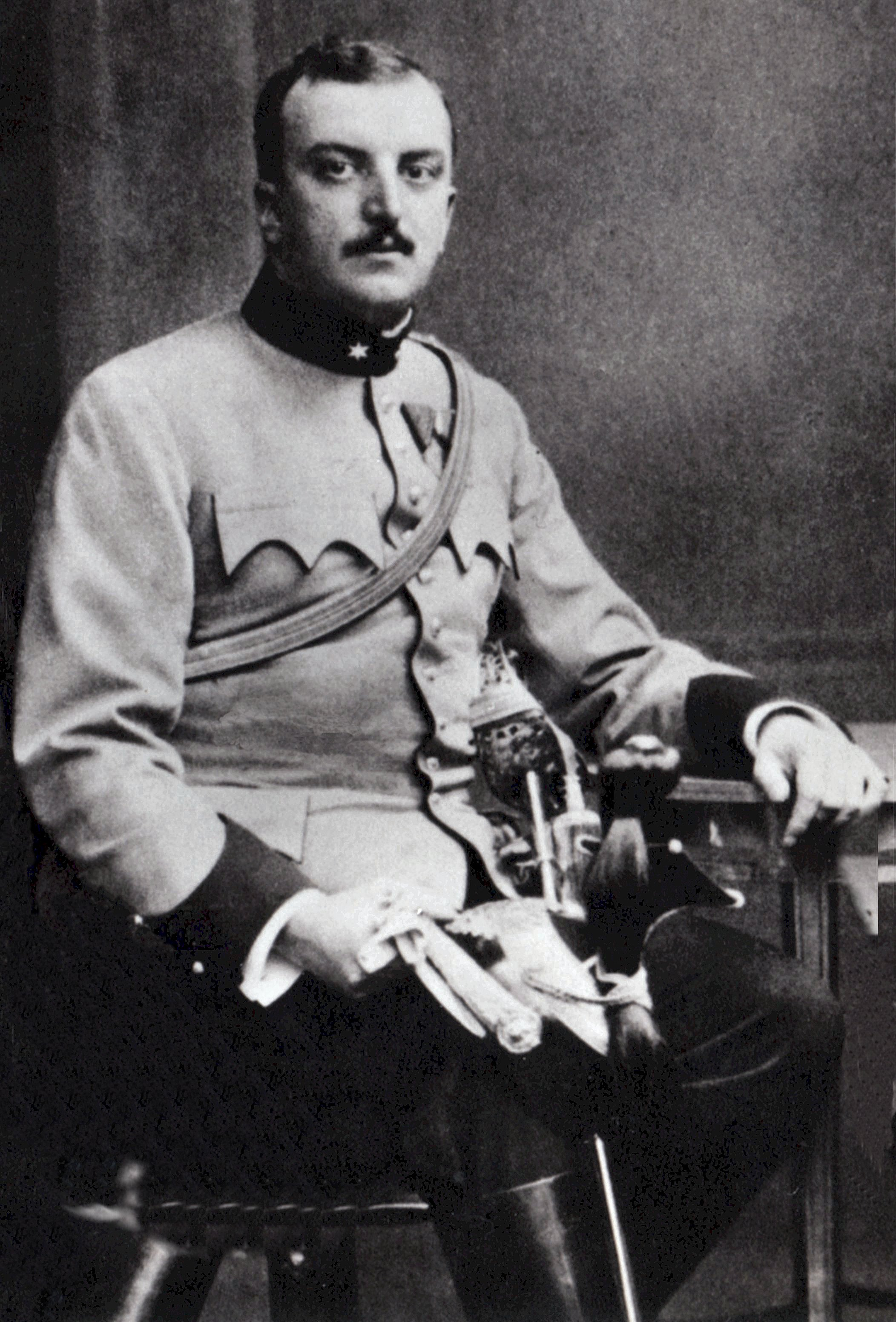 Stephan Wassilko von Serecki um 1905